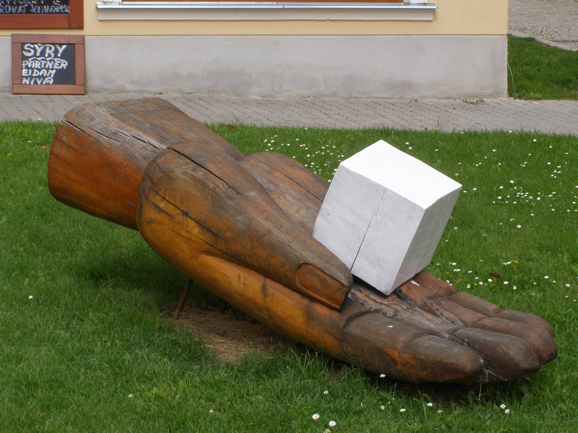 Dačice, Palackého náměstí, plastika ruky držící kostku cukru na přípomínku, že v blízké rafinerii Jakub Kryštof Rad vyrobil roku 1843 první kostku cukru na světě